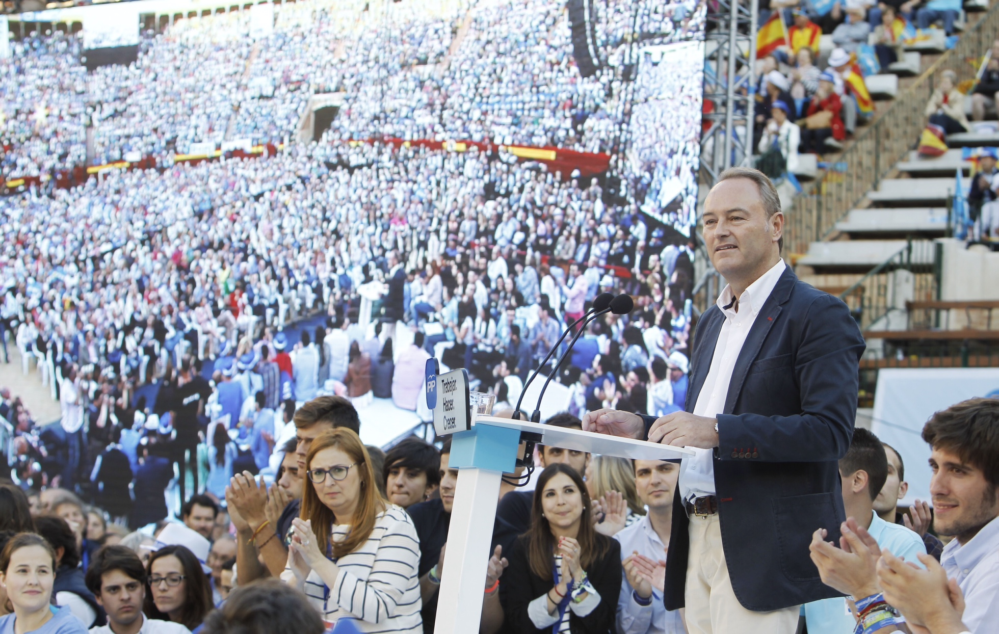 Fabra participa en el mitin central del PPCV en la plaza de toros de Valencia